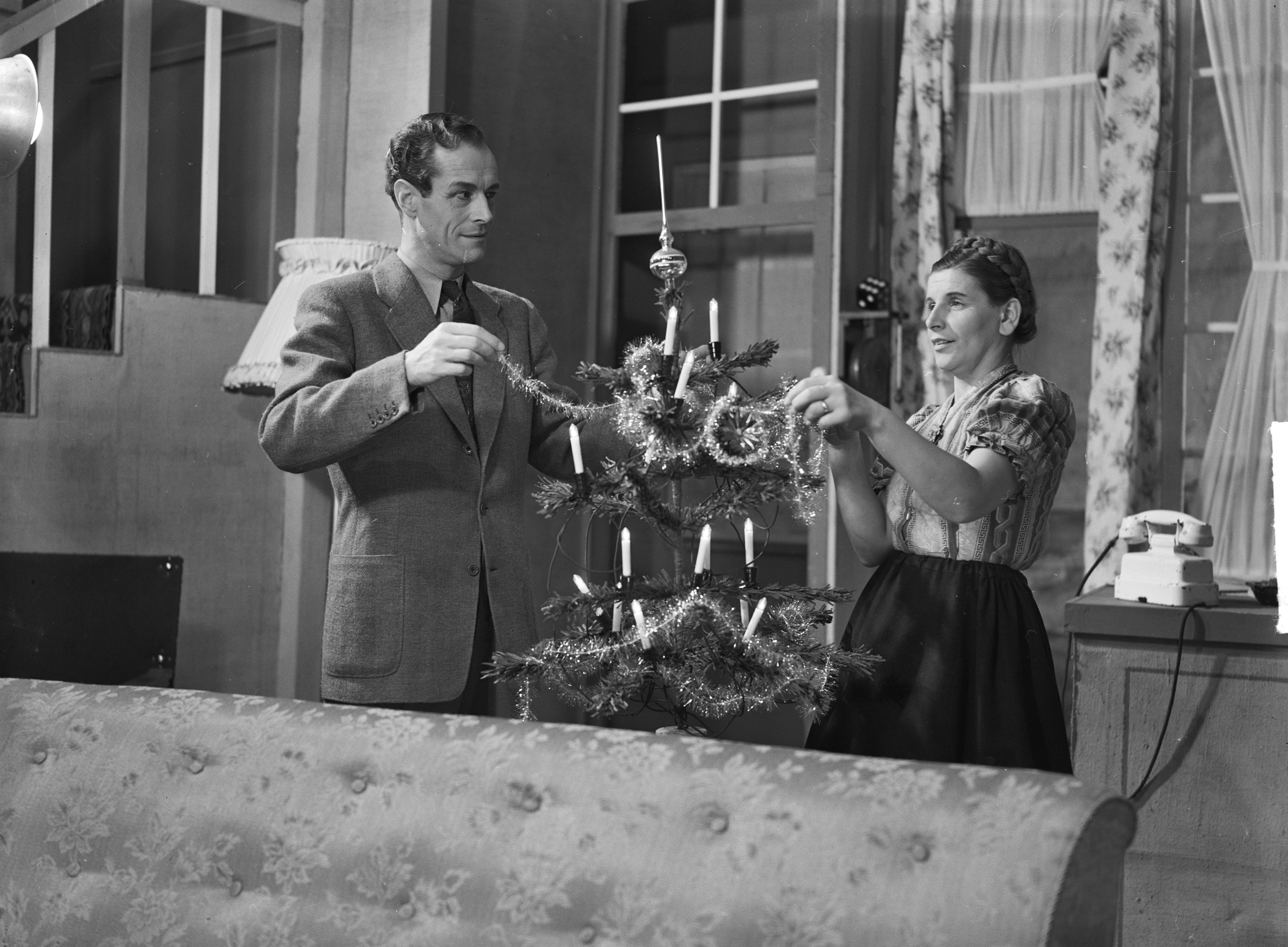 Collectie / Archief : Fotocollectie Anefo Reportage / Serie : [ onbekend ] Beschrijving : Premiere "Zomer in December" / Nell Koppen / Gijsbert Tersteeg Datum : 15 december 1949 Trefwoorden : acteurs, kunst, toneel, toneelspelers Persoonsnaam : Koppen, Nell; Tersteeg, Gijsbert Fotograaf : Bilsen, Joop van / Anefo Auteursrechthebbende : Nationaal Archief Materiaalsoort : Negatief (zwart/wit) Nummer archiefinventaris : bekijk toegang 2.24.01.04 Bestanddeelnummer : 903-7482 Reacties Geplaatst door Maaike op 25 oktober 2012 - 22:36. Instellingsnamen: toneelgroep Het Vrije Toneel Geplaatst door Toneelliefhebber op 14 november 2017 - 21:43. locatie: Centraal Theater Plaats: Amsterdam, Noord-Holland